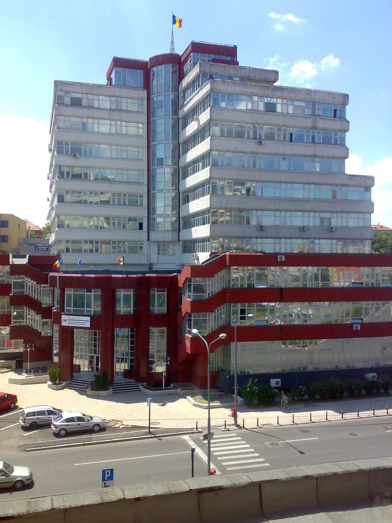 Sediul Direcţiei Generale a Finanţelor Publice Argeş, Piteşti, România